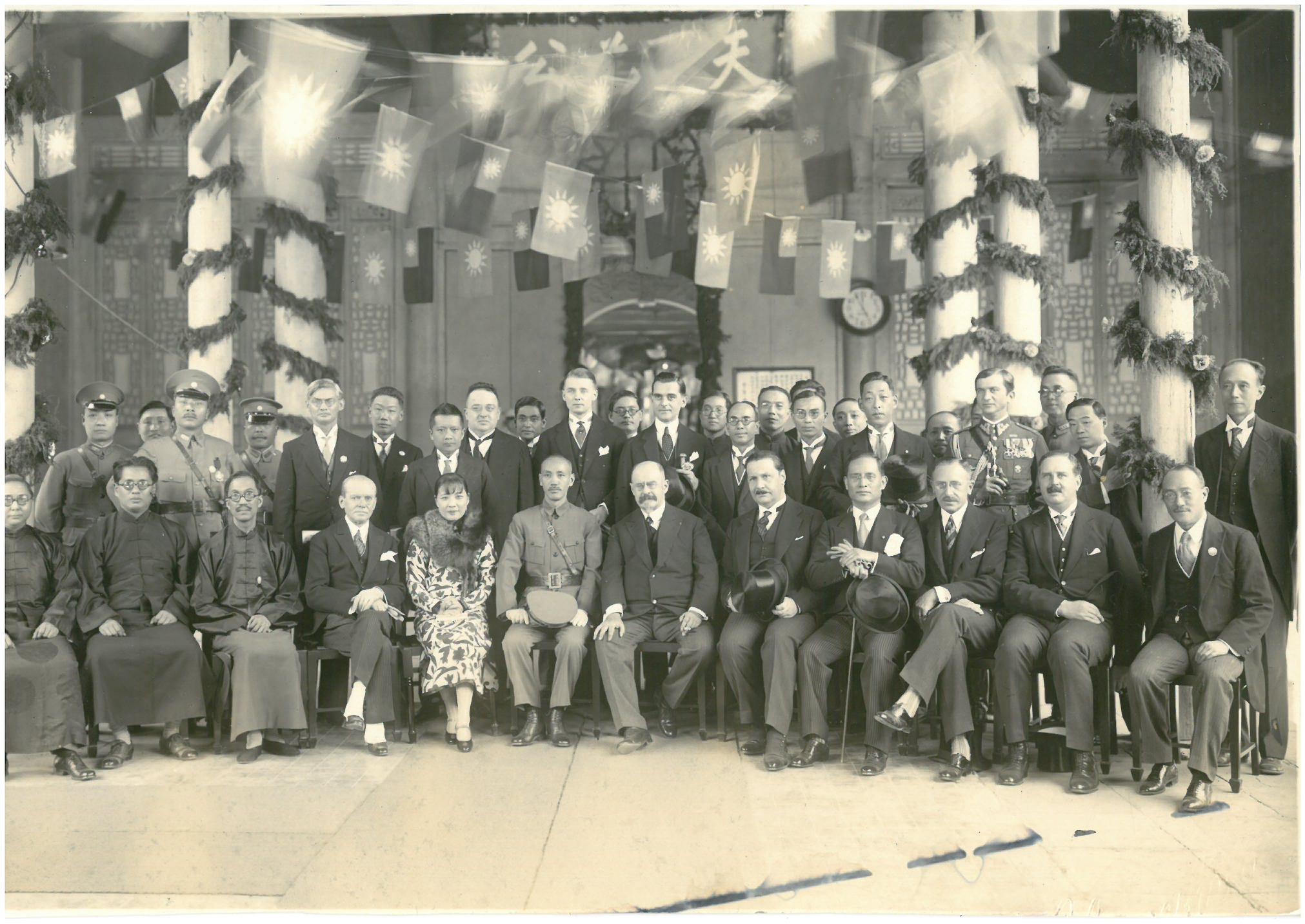 Podpisanie 18 września 1929 roku w Nankinie Traktatu przyjaźni, handlowego i nawigacyjnego pomiędzy Rzeczpospolitą Polską a Republiką Chińską. Dr Jan Krysiński trzeci rząd, czwarty z lewej.